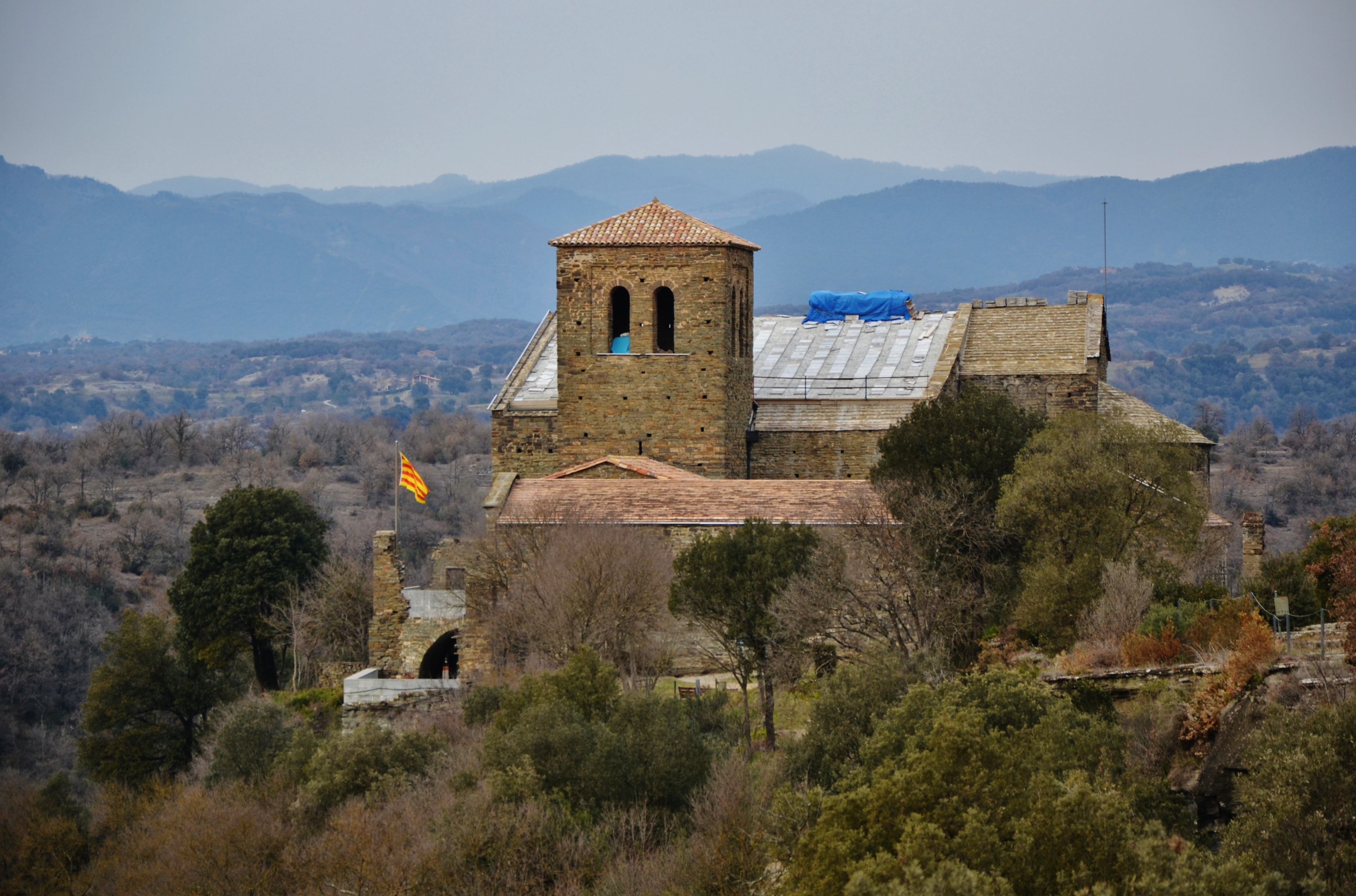 Monestir de Sant Pere de Casserres (les Masies de Roda)